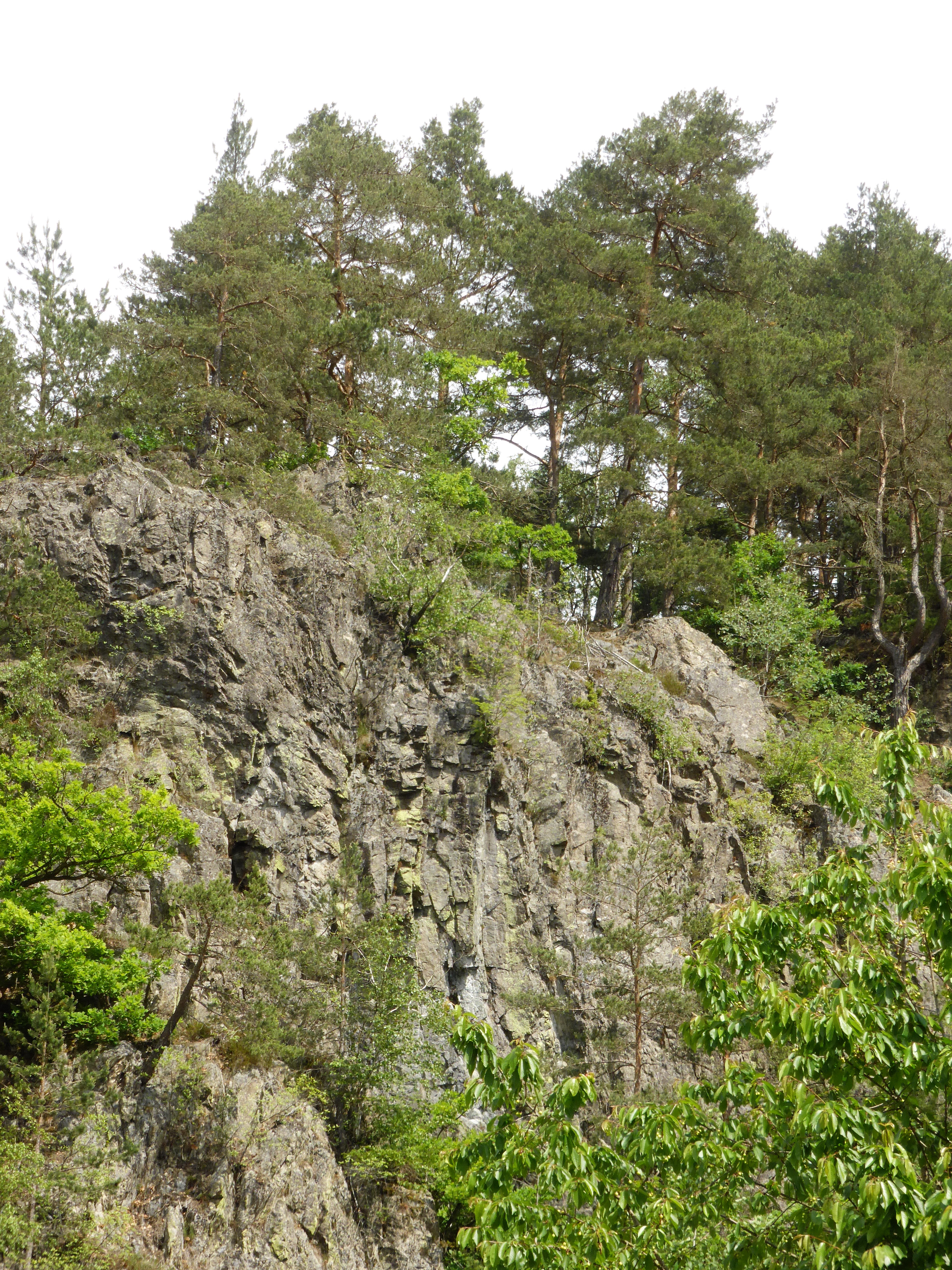 Der ehemalige Steinbrüch östlich von Riedmühle liegt am Rande des Pfahlquarzes. Es stehen hier 20 m hohe mächtige Ultramylonite, dessen Mineral eine diaphtoritische Umwandlung zeigt.